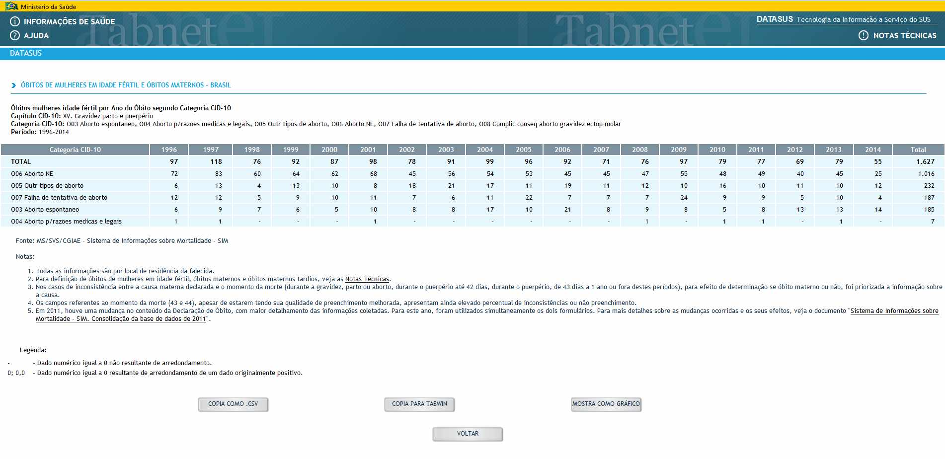 Óbitos maternos por Ano do Óbito segundo Capítulo CID-10 - Período: 1996-2014. Fonte: MS/SVS/CGIAE - Sistema de Informações sobre Mortalidade - SIM